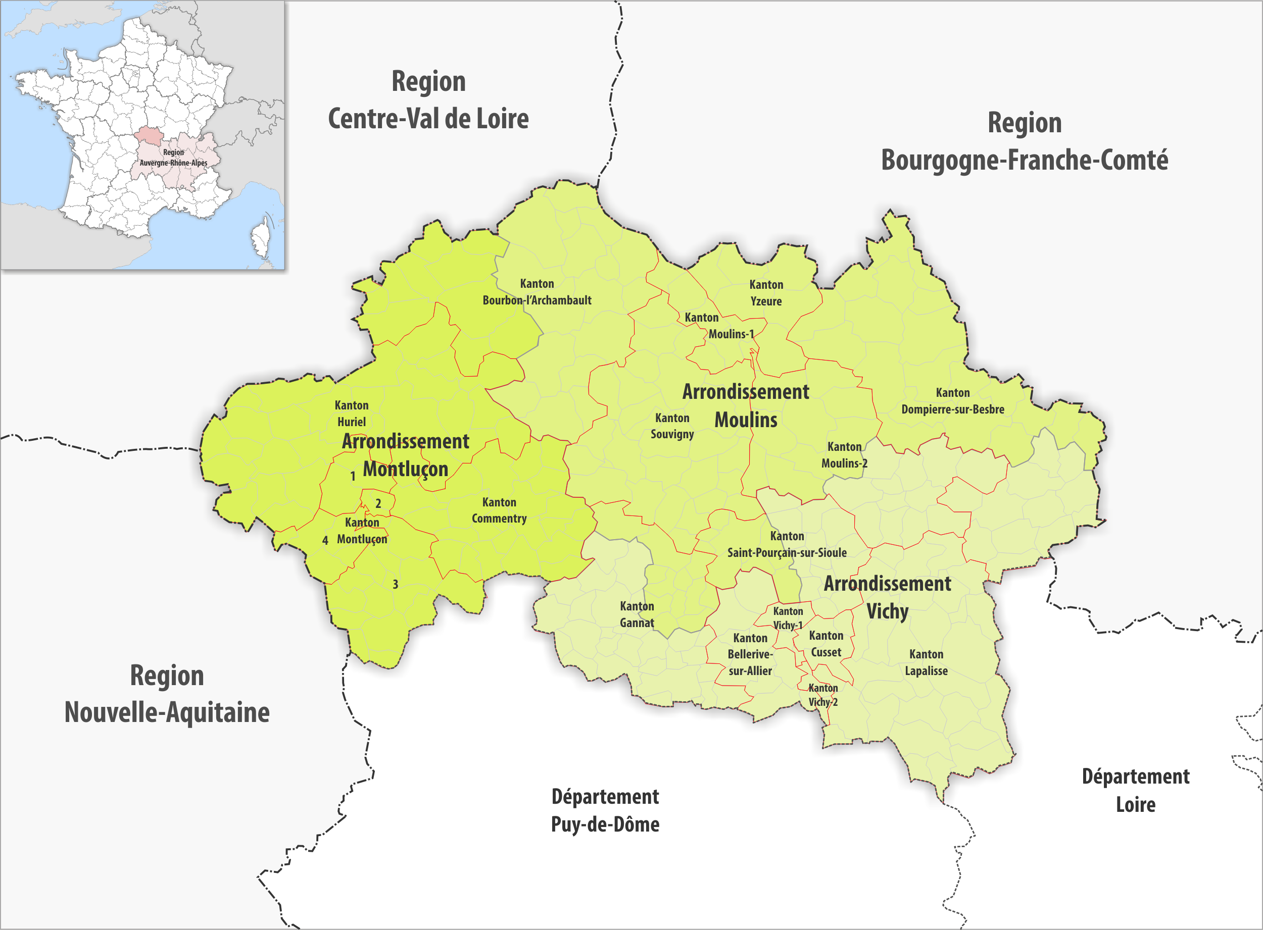 Gemeinden, Kantone und Arrondissemente im Departement Allier